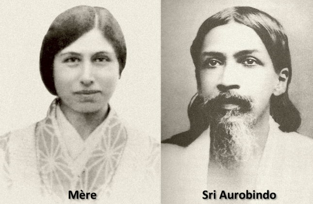 Mirra Richard (La Madre) y Sri Aurobindo